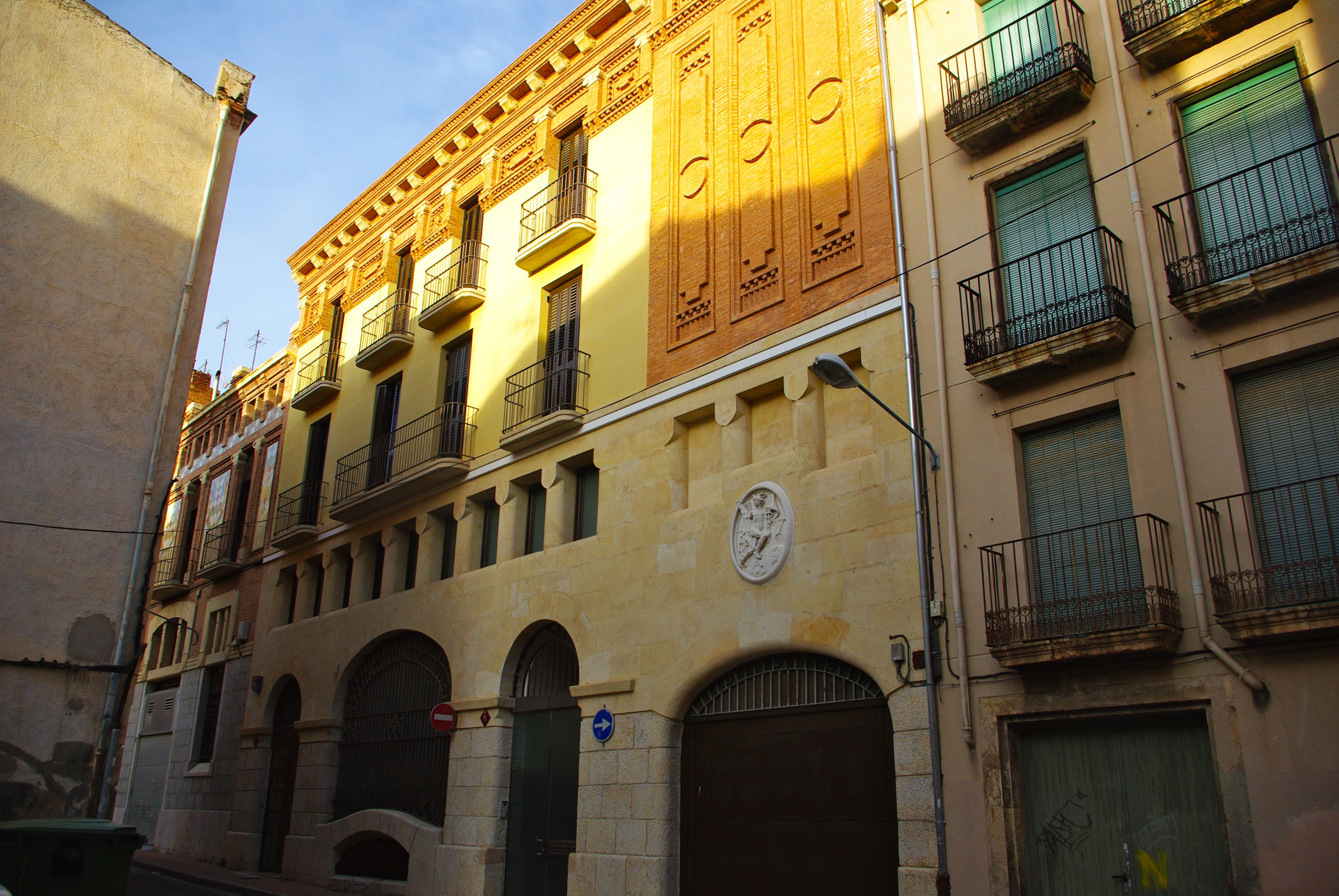 Magatzems de Ramon Vilella al carrer de Sant Esteve de Reus